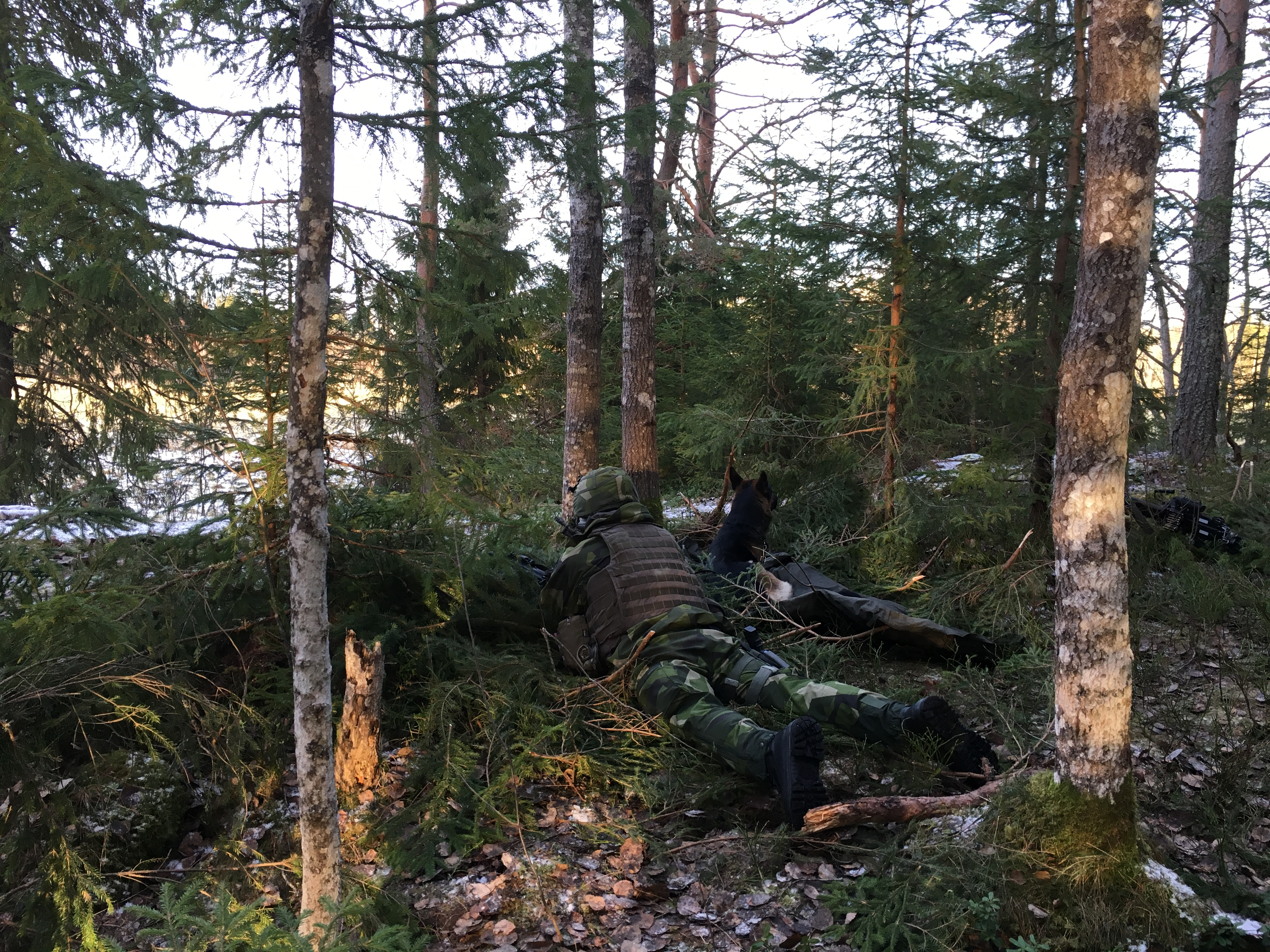 Hundförare ur 161.4strilförsvarskompaniet